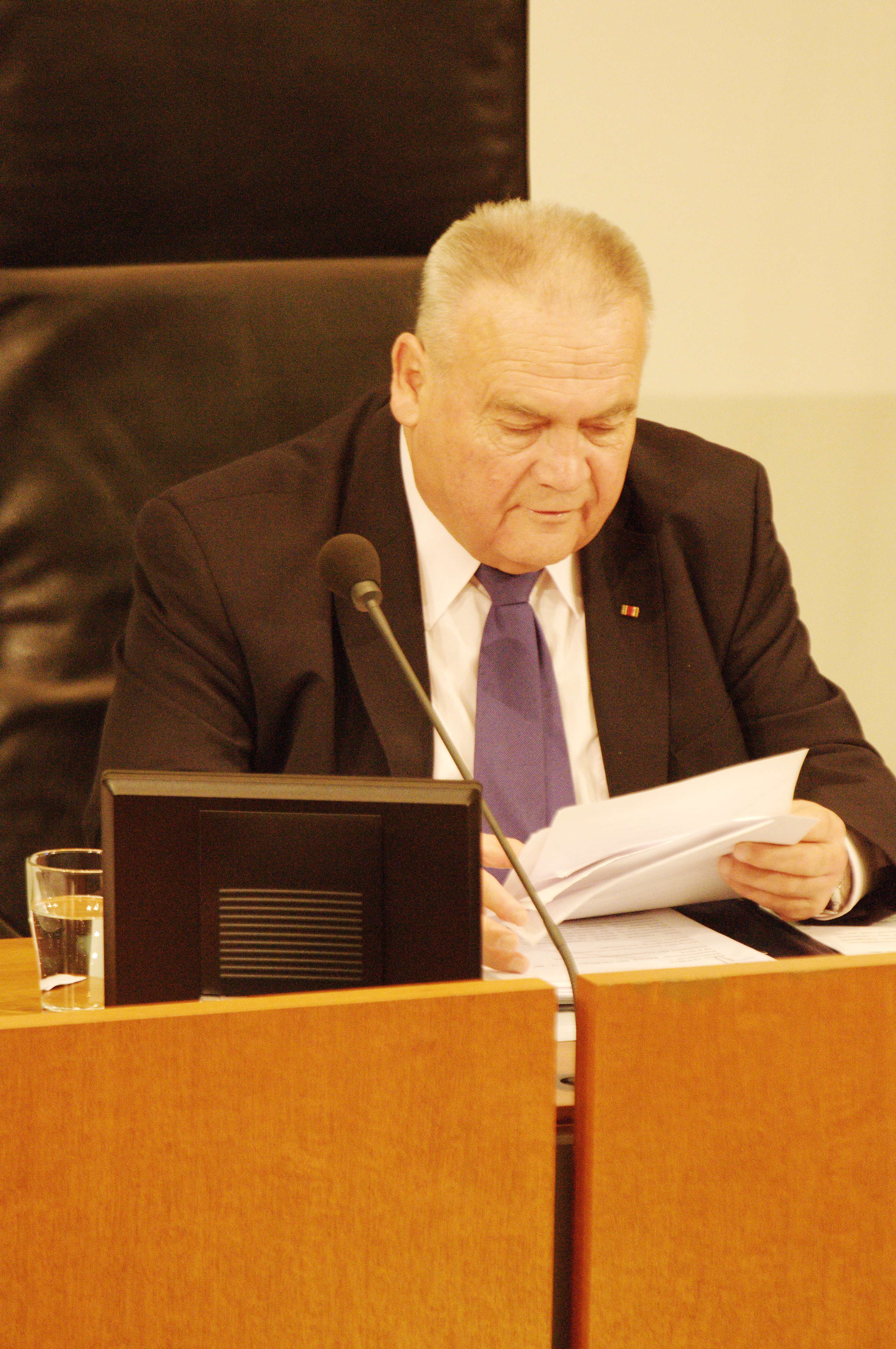 de Lothar Koch, Alterspräsident des Niedersächsischen Landtages. Wikipedia im Landtag – Niedersachsen 19. Februar 2013 in HannoverDieses Bild entstand während der Konstituierende Sitzung des Landtages Niedersachsen 2013 im Landtag Hannover. This work is free and may be used by anyone for any purpose. If you wish to use this content, you do not need to request permission as long as you follow any licensing requirements mentioned on this page.